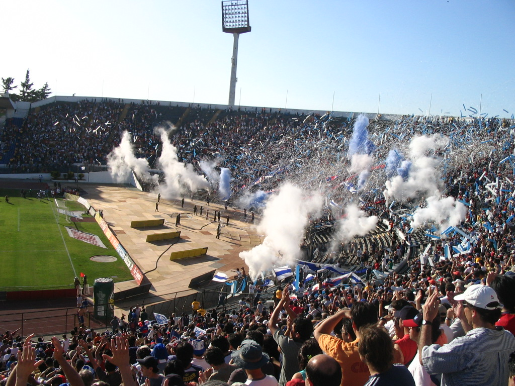 Foto barra los cruzados